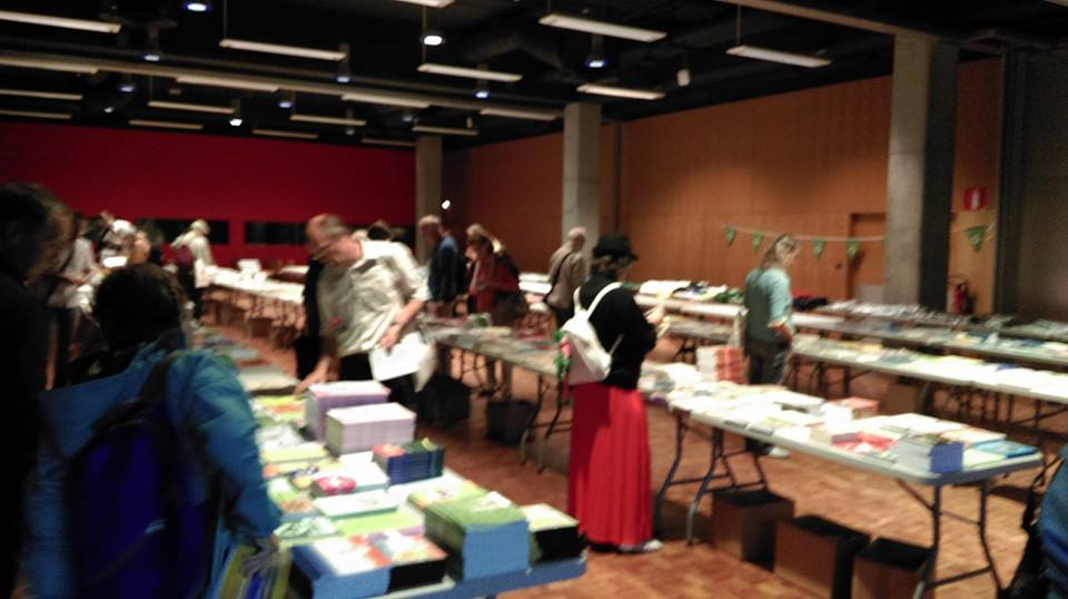 Libroservo dum UK 2015